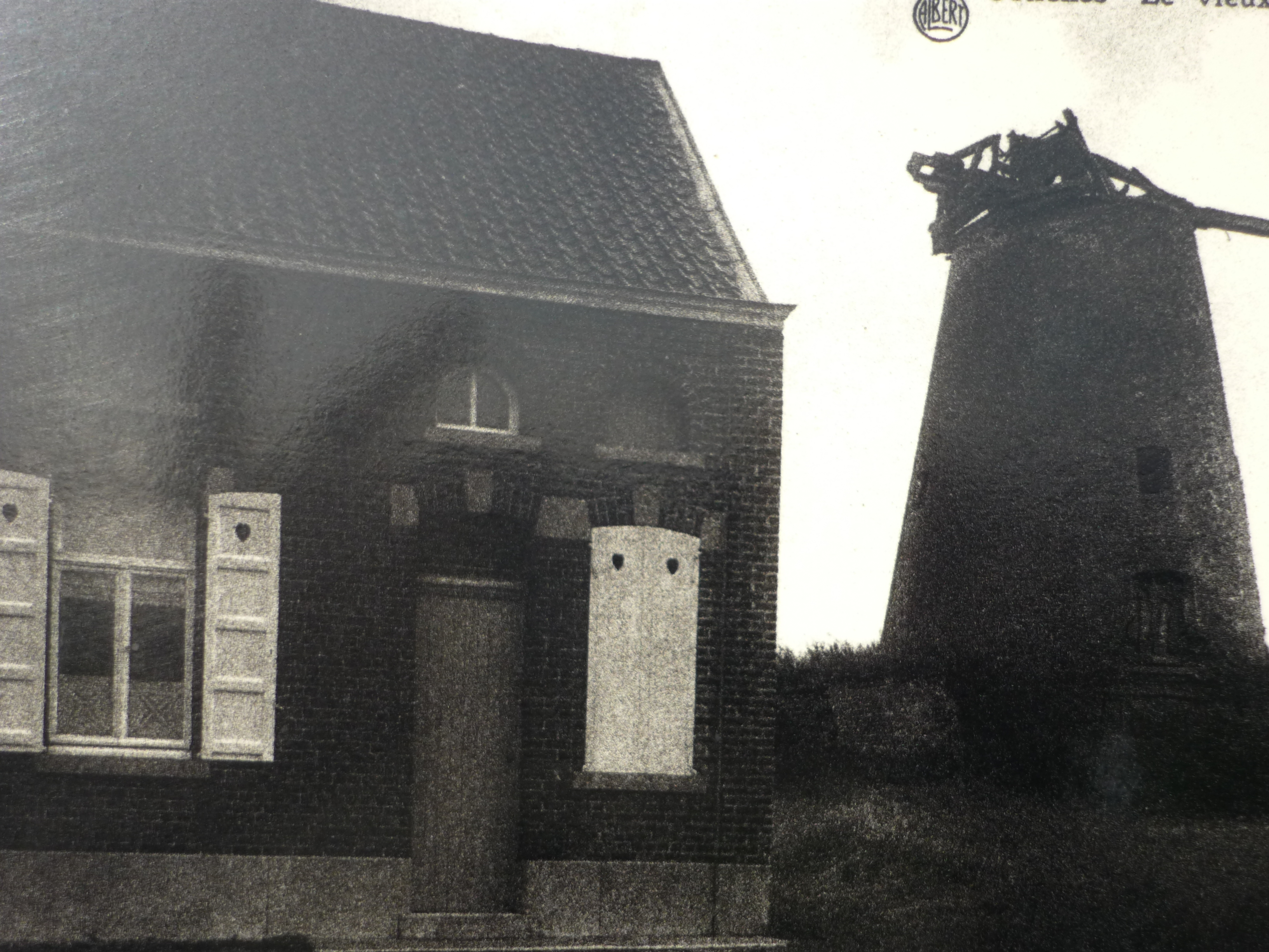 Ancienne photo présente près de l'édifice.